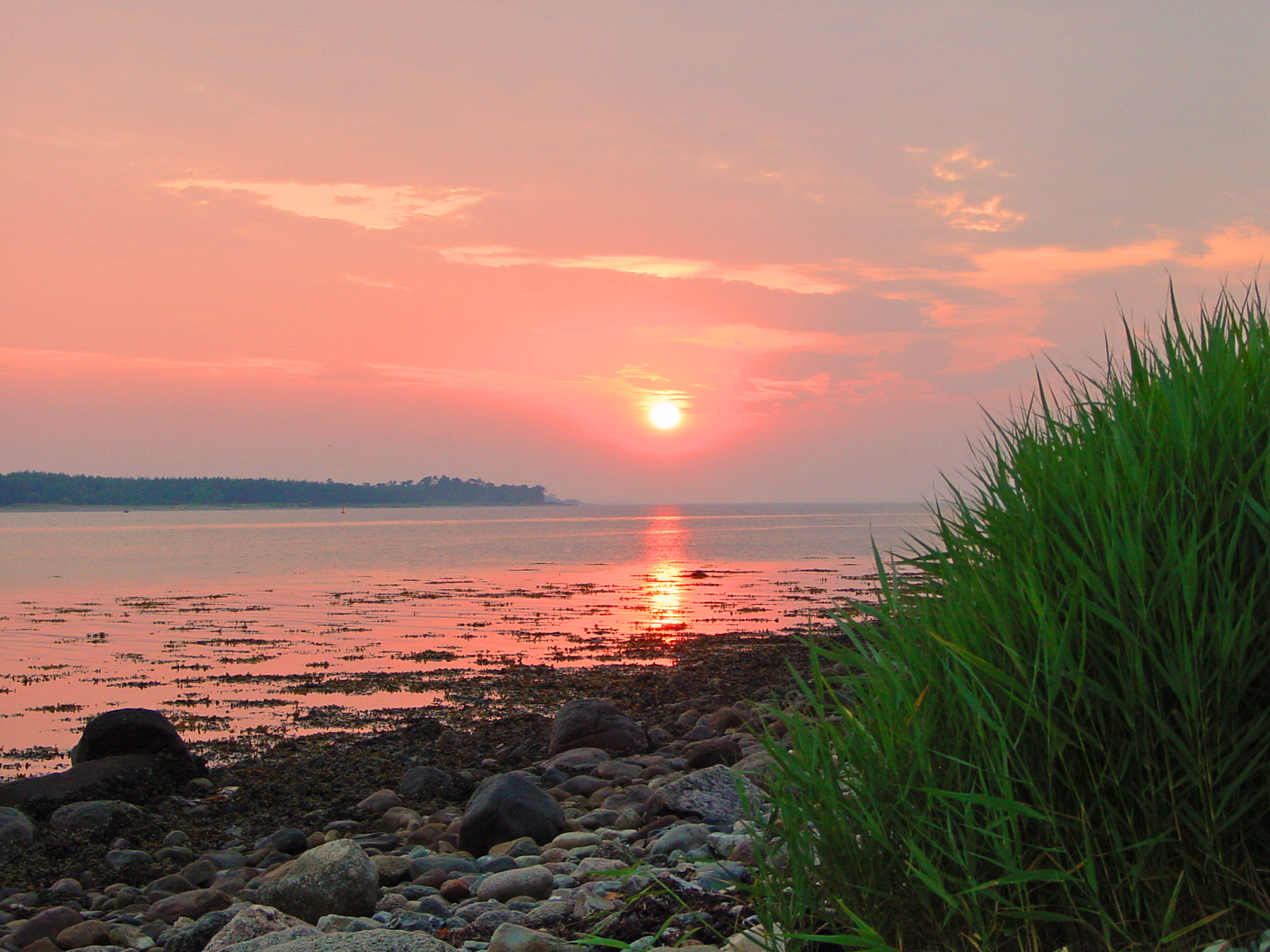 Odense Fjord